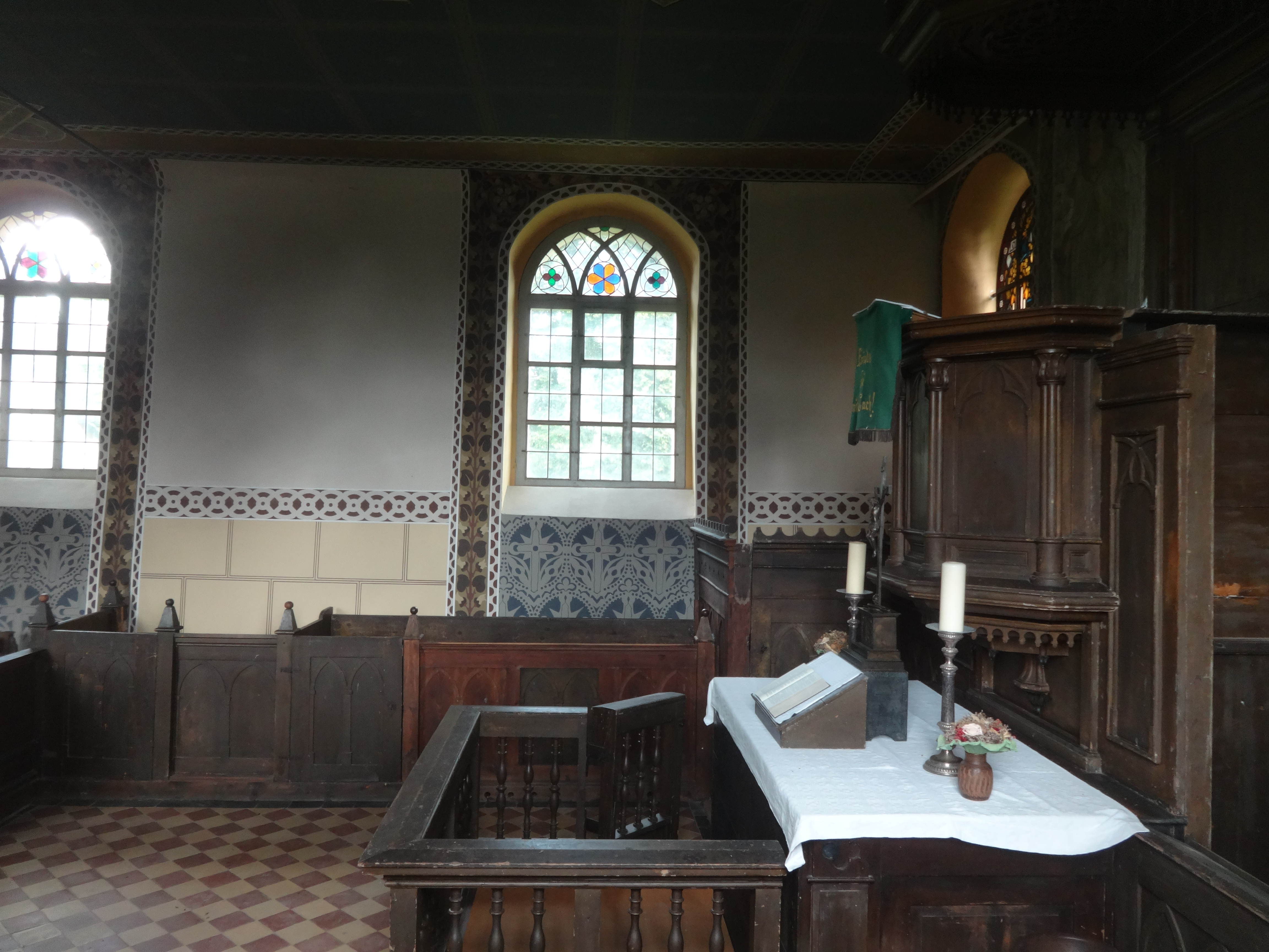 Kirche Alt Kosenow, auch Marienkirche und St.-Marien-Kirche genannt, ein aus dem 14. Jahrhundert stammendes Kirchengebäude im Ortsteil Alt Kosenow der Gemeinde Neu Kosenow.